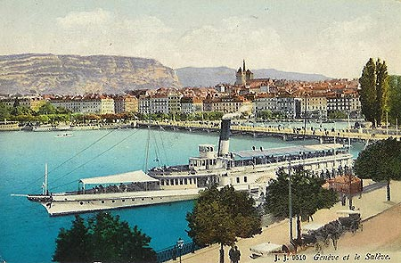 Le bateau "Général Dufour" avant 1928